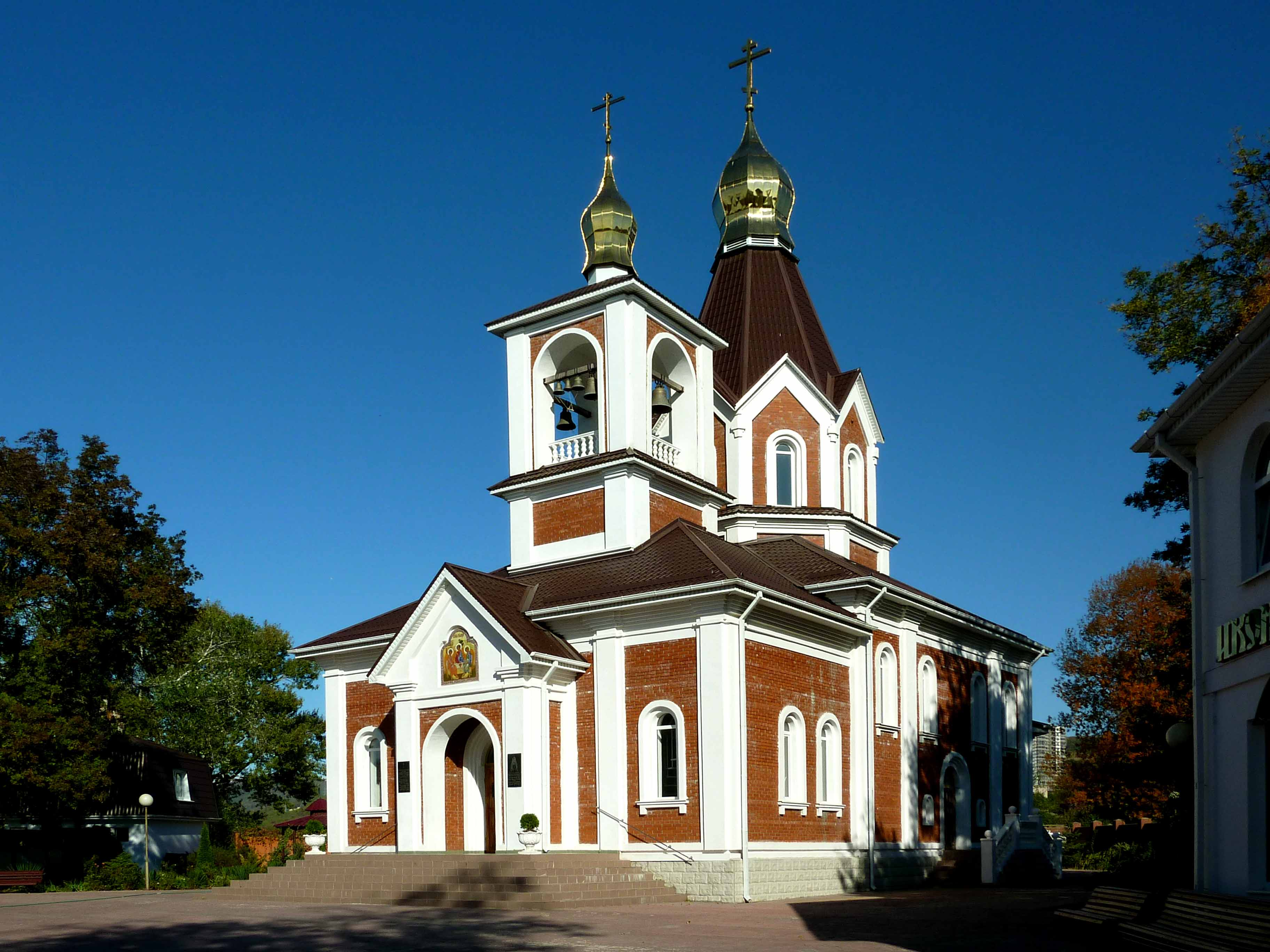 Храм во имя Сергия Радонежского в Дивноморске